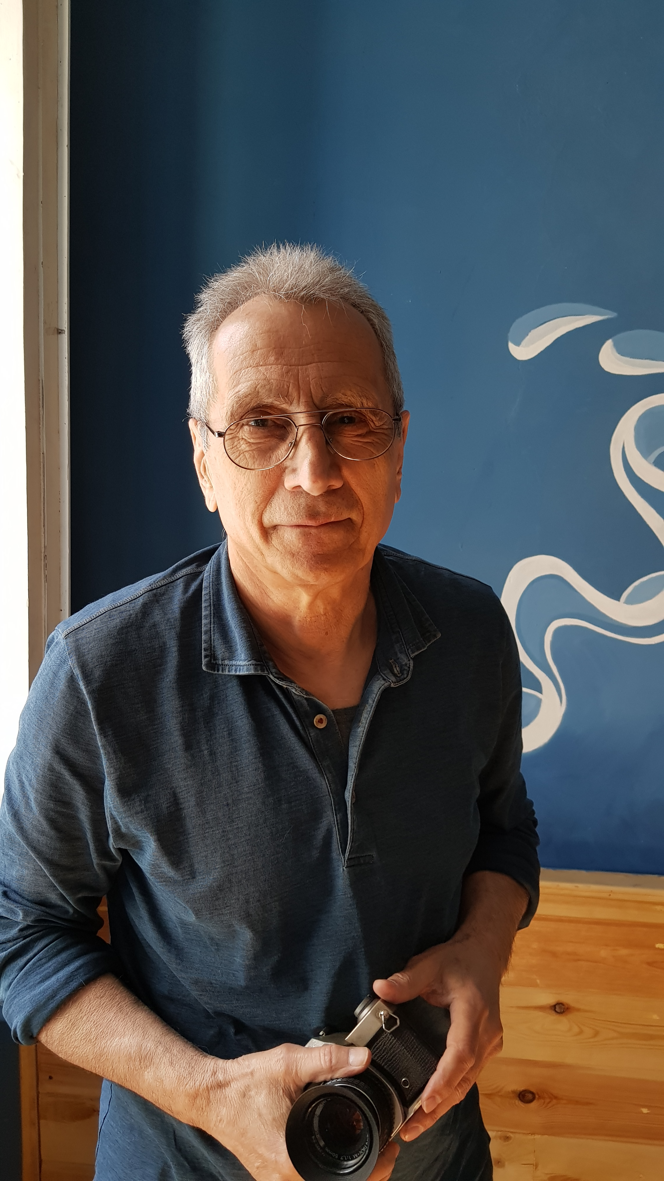 фотография режиссёра